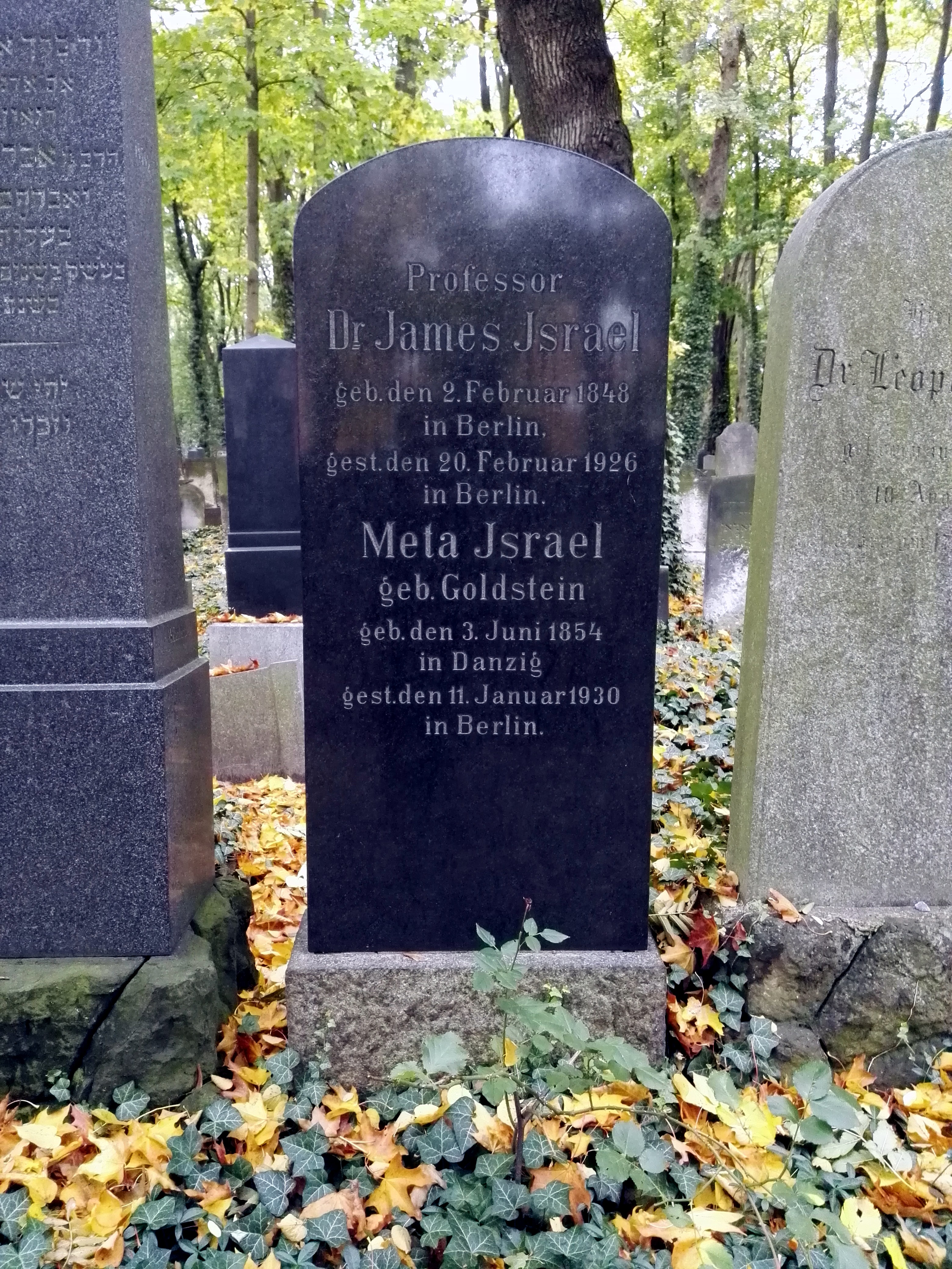 Grab von James Israel auf dem Jüdischer Friedhof Schönhauser Allee in Berlin-Prenzlauer Berg